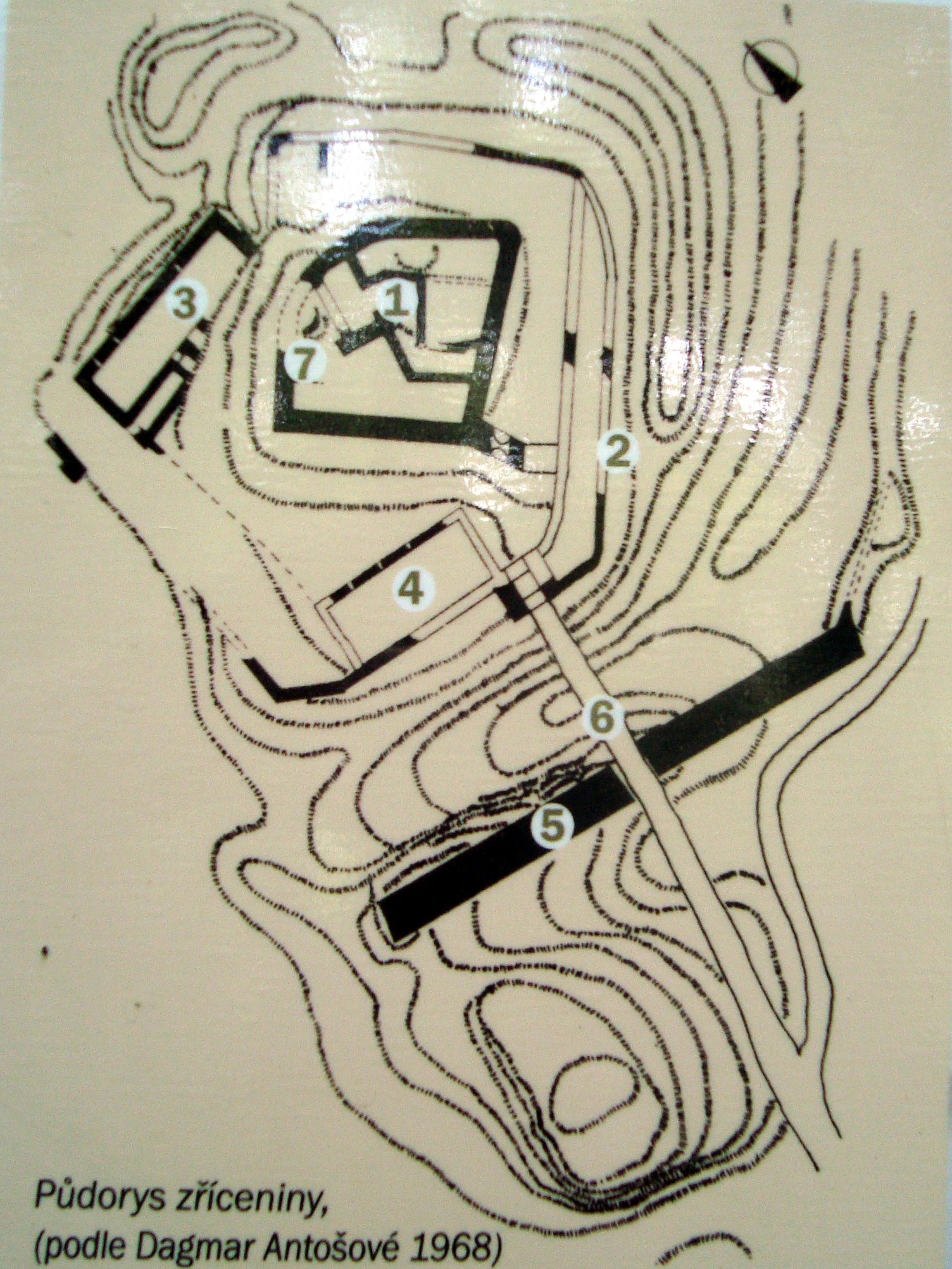 detail informačního panelu u zříceniny Templštejna